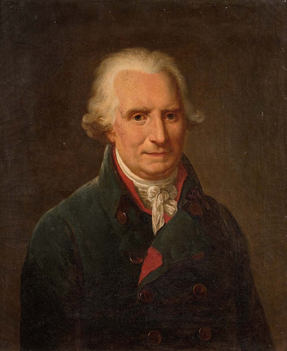 Jean-Frédéric Perregaux (1744-1808)